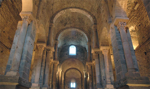 Interior de l'església de Sant Pere de Rodes